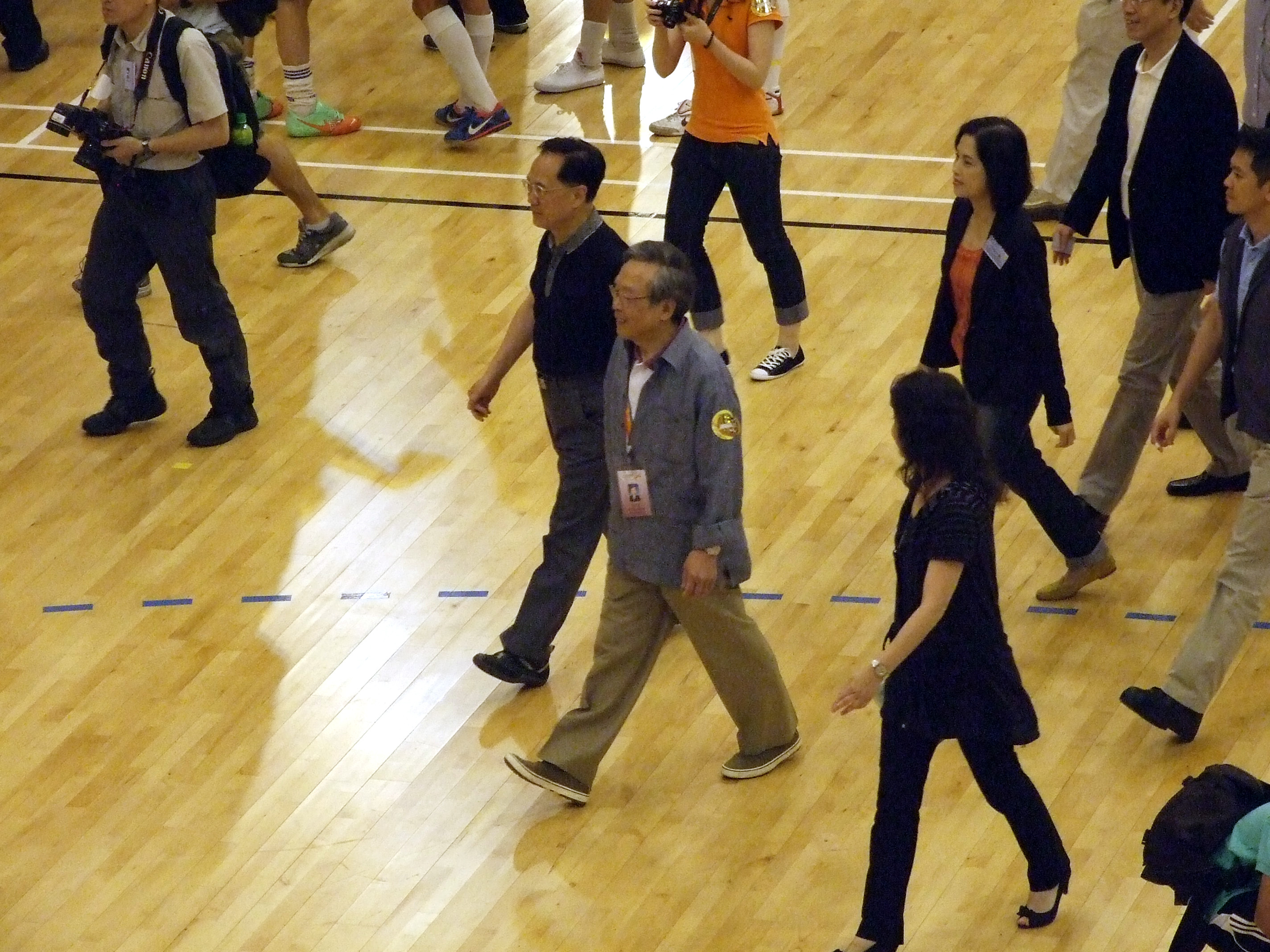 中文（香港）: 2011年全港運動會五人足球比賽行政長官曾蔭權擔任頒獎嘉賓